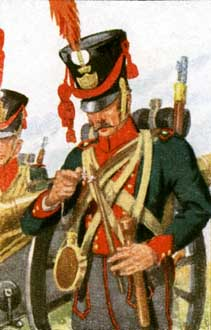 Sächsischer Soldat: 1813-1815 Sächsische Generalität und Infanterie; Kanonier der Fußartillerie